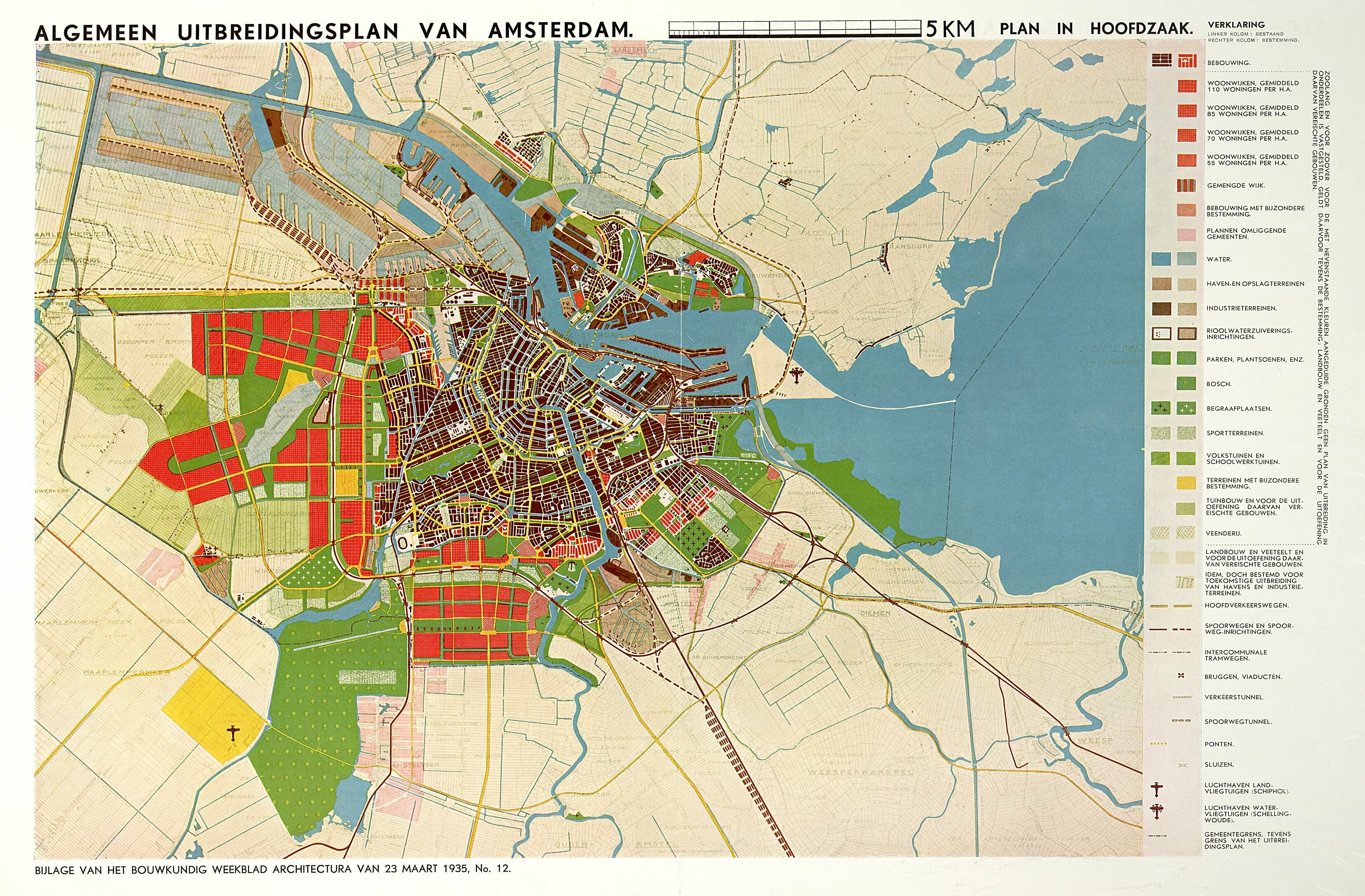 Plankaart van het Algemeen Uitbreidingsplan voor Amsterdam, 1935. De nieuwe woongebieden zijn met rood ingekleurd.